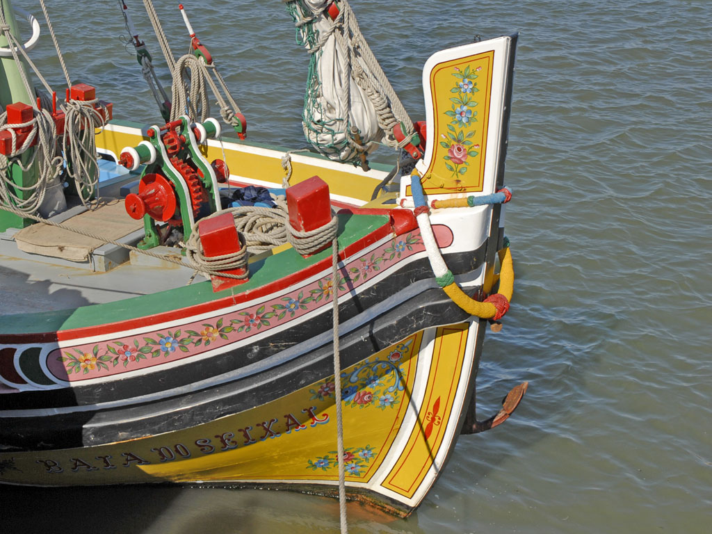 Seixal est une ville de 31.000 habitants située dans le district de Setubal, sur les bords du Tage, à 20 Km de Lisbonne. L'écomusée de Seixal étudie et valorise le patrimoine maritime et industriel de la région à travers l'aménagement de sites et d'espaces d'interprétation. Son siège se trouve dans les locaux de l'ancienne usine de liège Mundet. (deutsch: Bug eines Varino in Seixal auf dem Tejo)